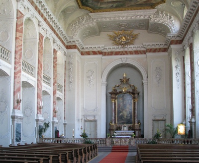 Schlosskirche in Mannheim.